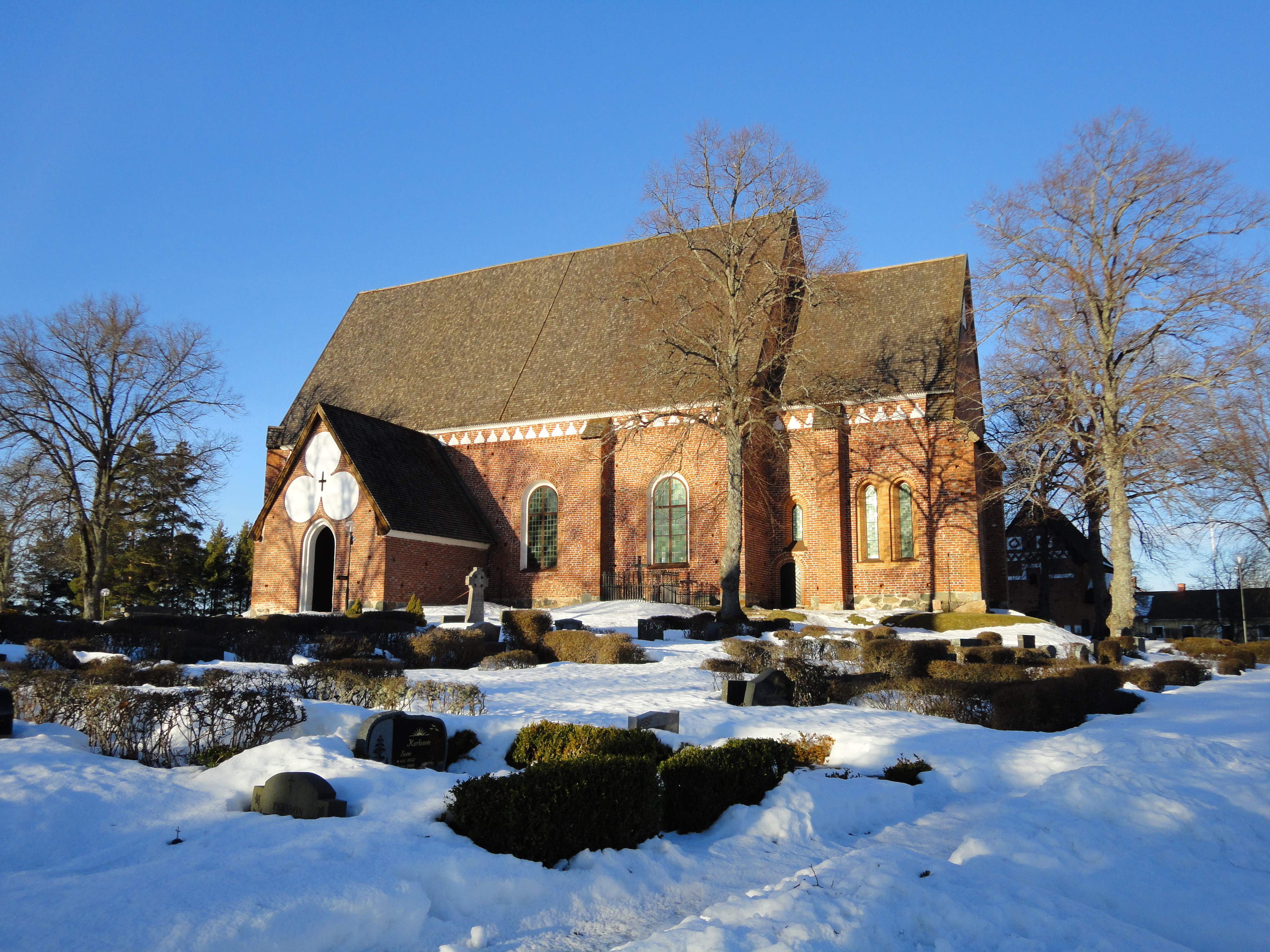 Vendels kyrka, Tierps kommun, Uppland. Långhus, kor och vapenhus.